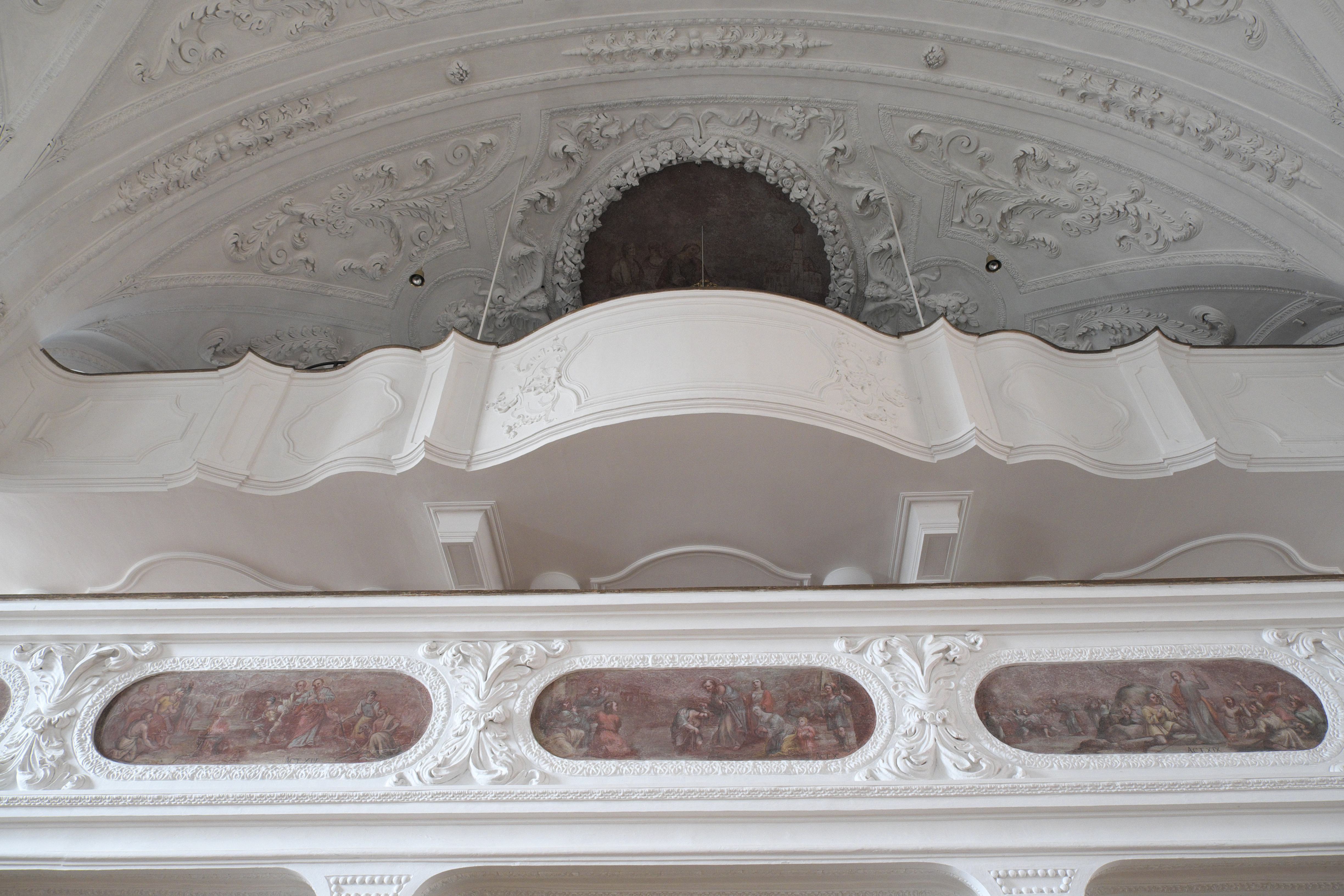 Katholische Pfarrkirche St. Peter und Paul in Ziemetshausen im Landkreis Günzburg (Bayern), 1687/88 bzw. 1690-94 Neubau von Johann Schmuzer; Doppelempore, Fresko an der unteren Emporenbrüstung von Johann Weidner, um 1695; Stuck an der oberen Empore von Franz Xaver Feuchtmayer dem Älteren, von 1749/50